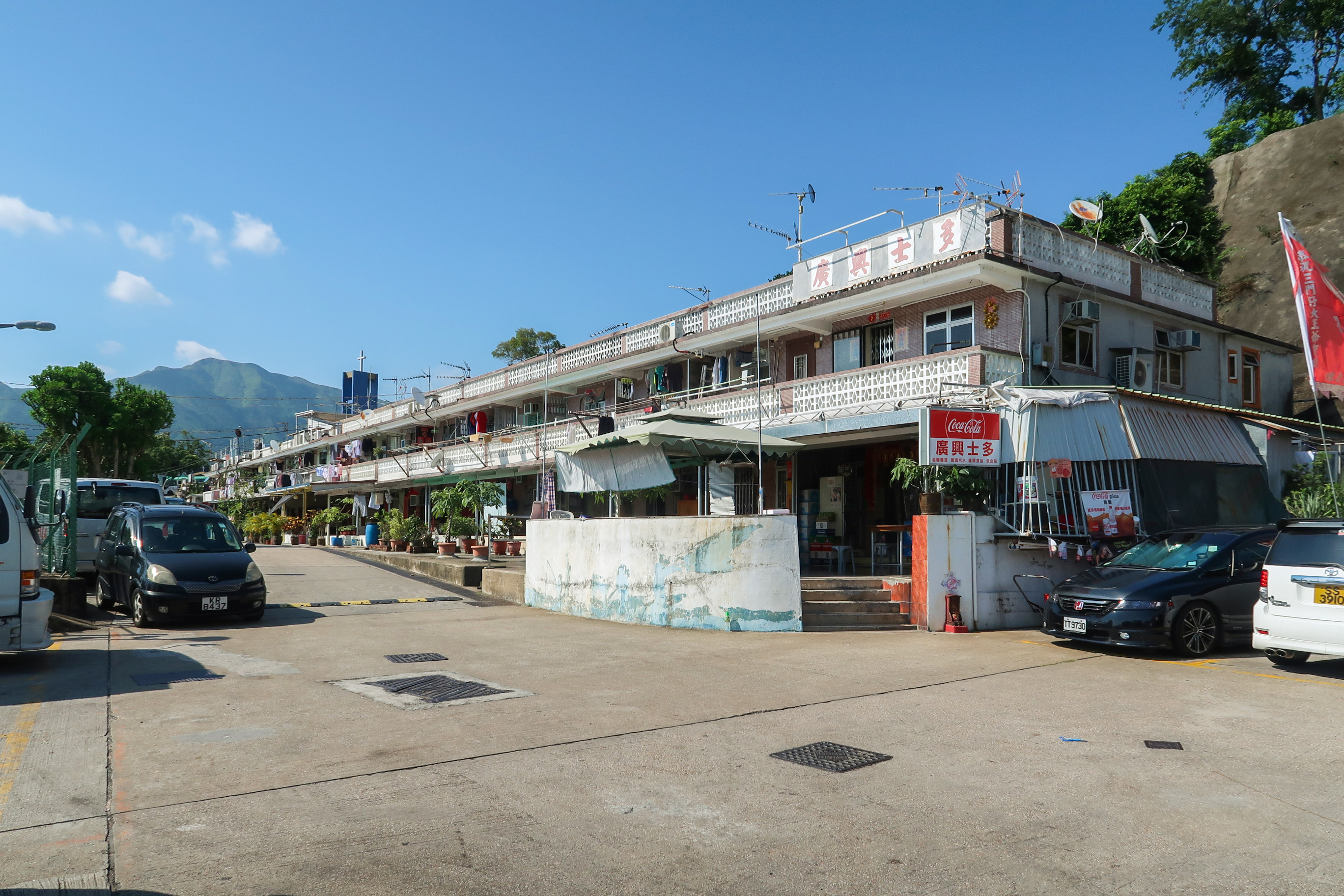 Sam Mun Tsai Village